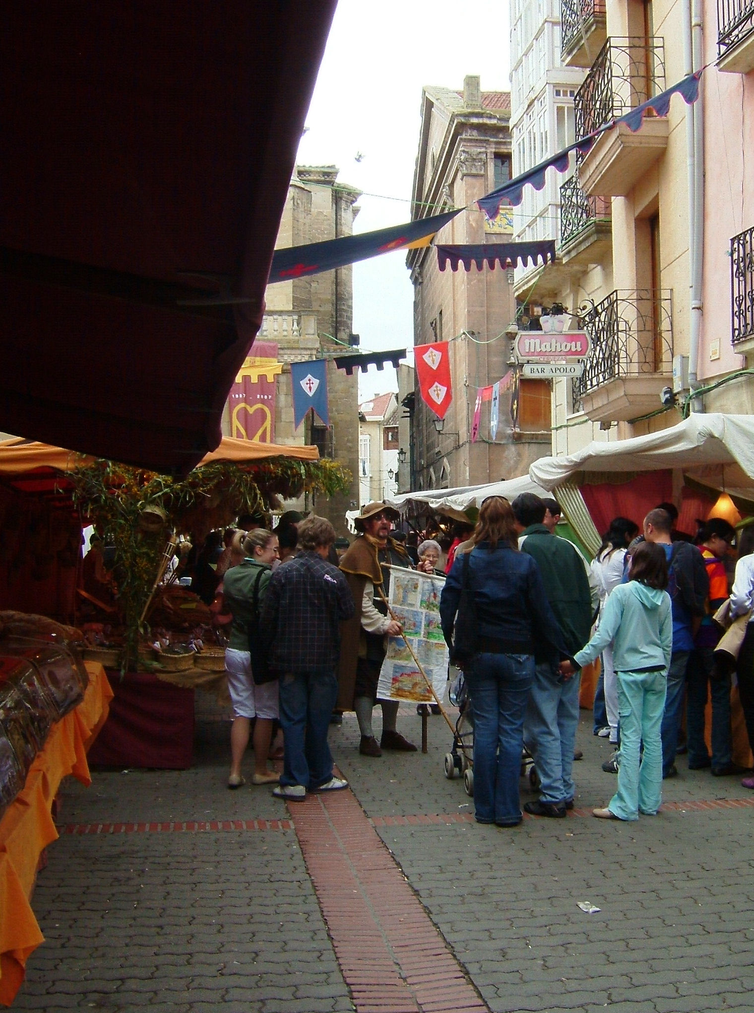 Mercado Medieval Miranda de Ebro